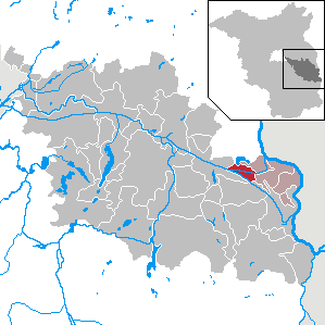 Groß Lindow in Brandenburg (Country) - District Oder-Spree